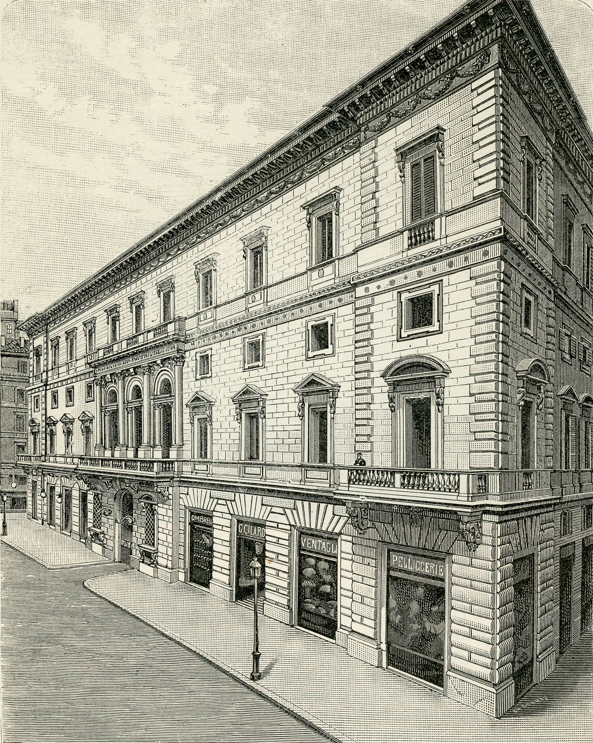 Roma: Palazzo Marignoli (xilografia).